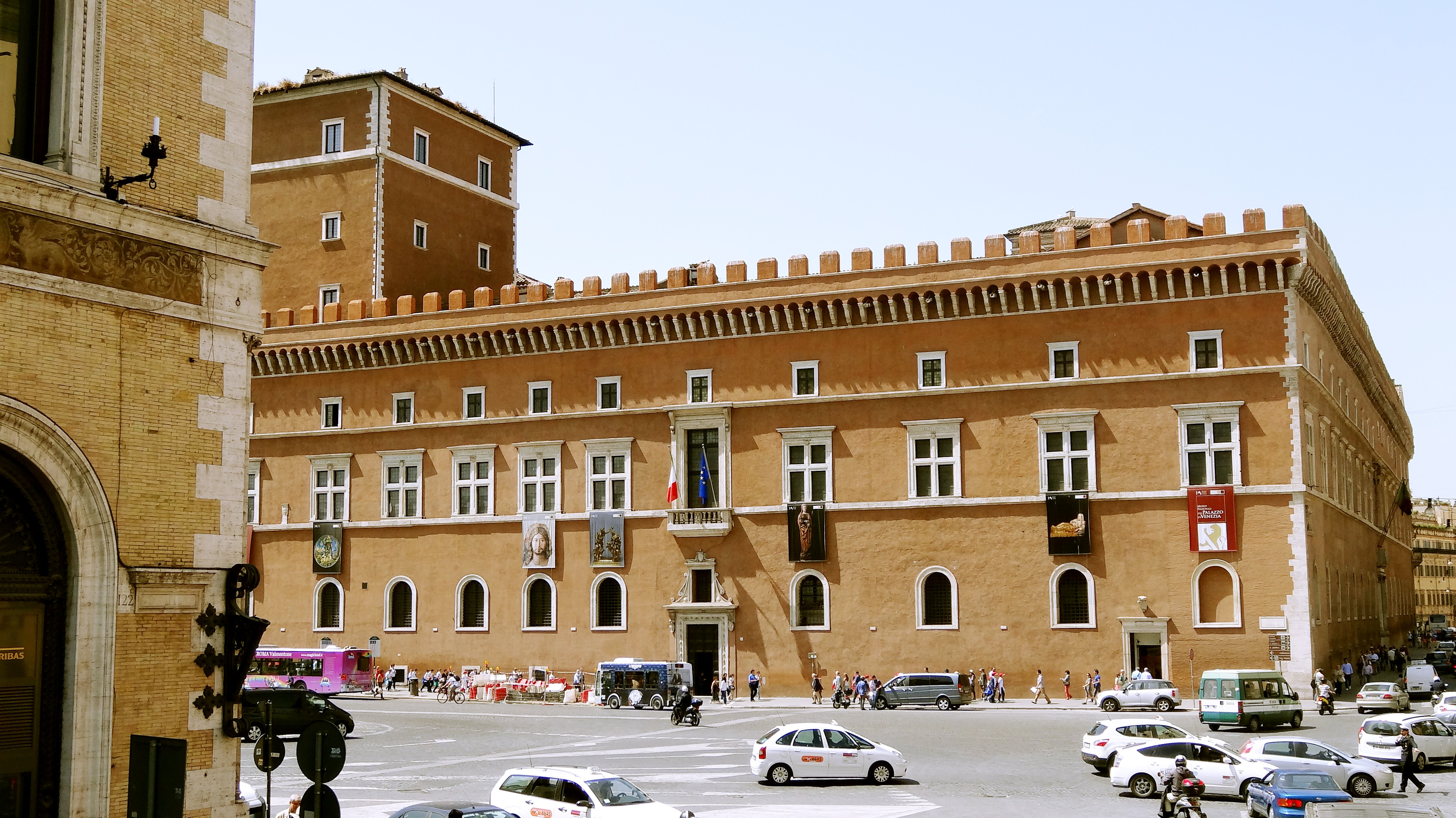 Italia - Roma 2013